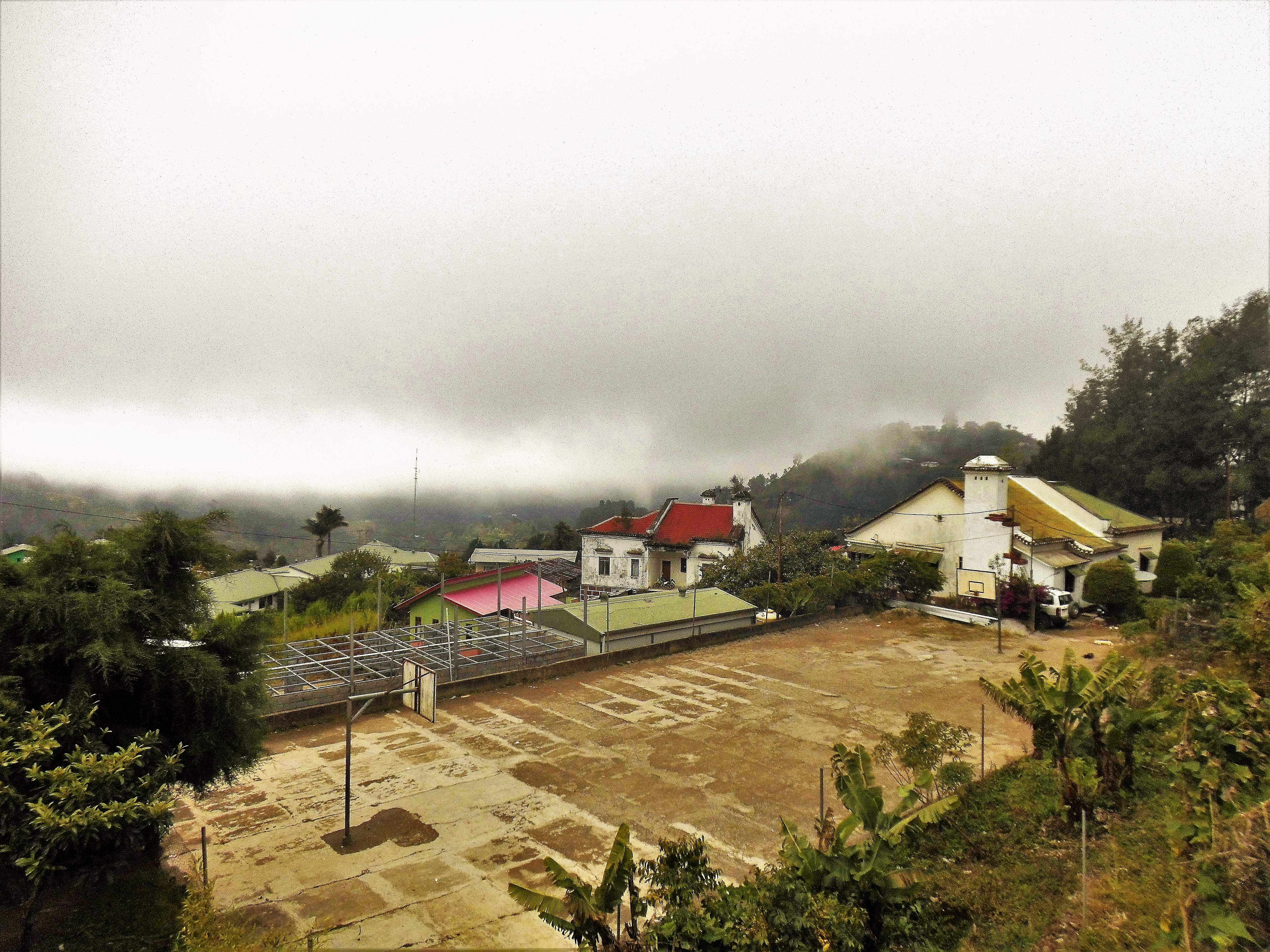 Basketballfeld bei der Kirche von Maubisse